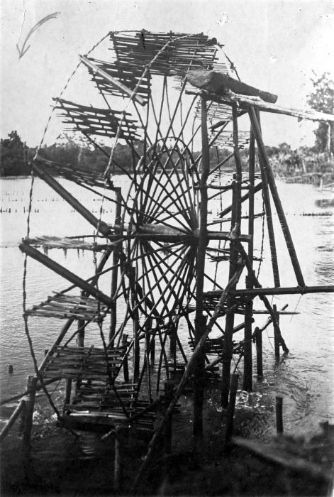 Repronegatief. Kintjir of waterschepwiel in Djambi, Sumatra